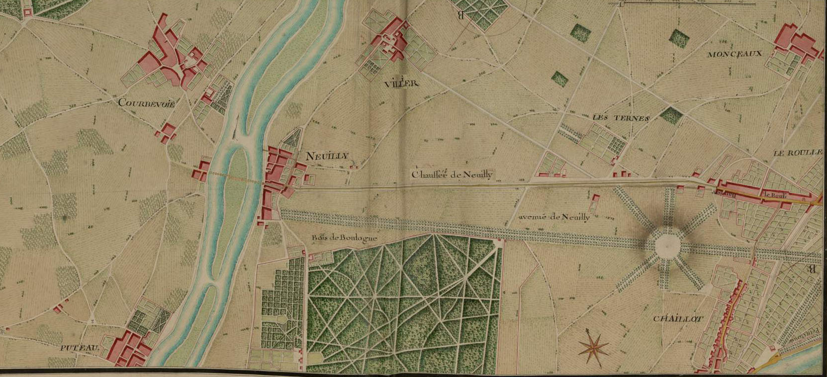 archim carte partielle de l'Ouest de Paris en 1760, Etoile de Chaillot Neuilly sur